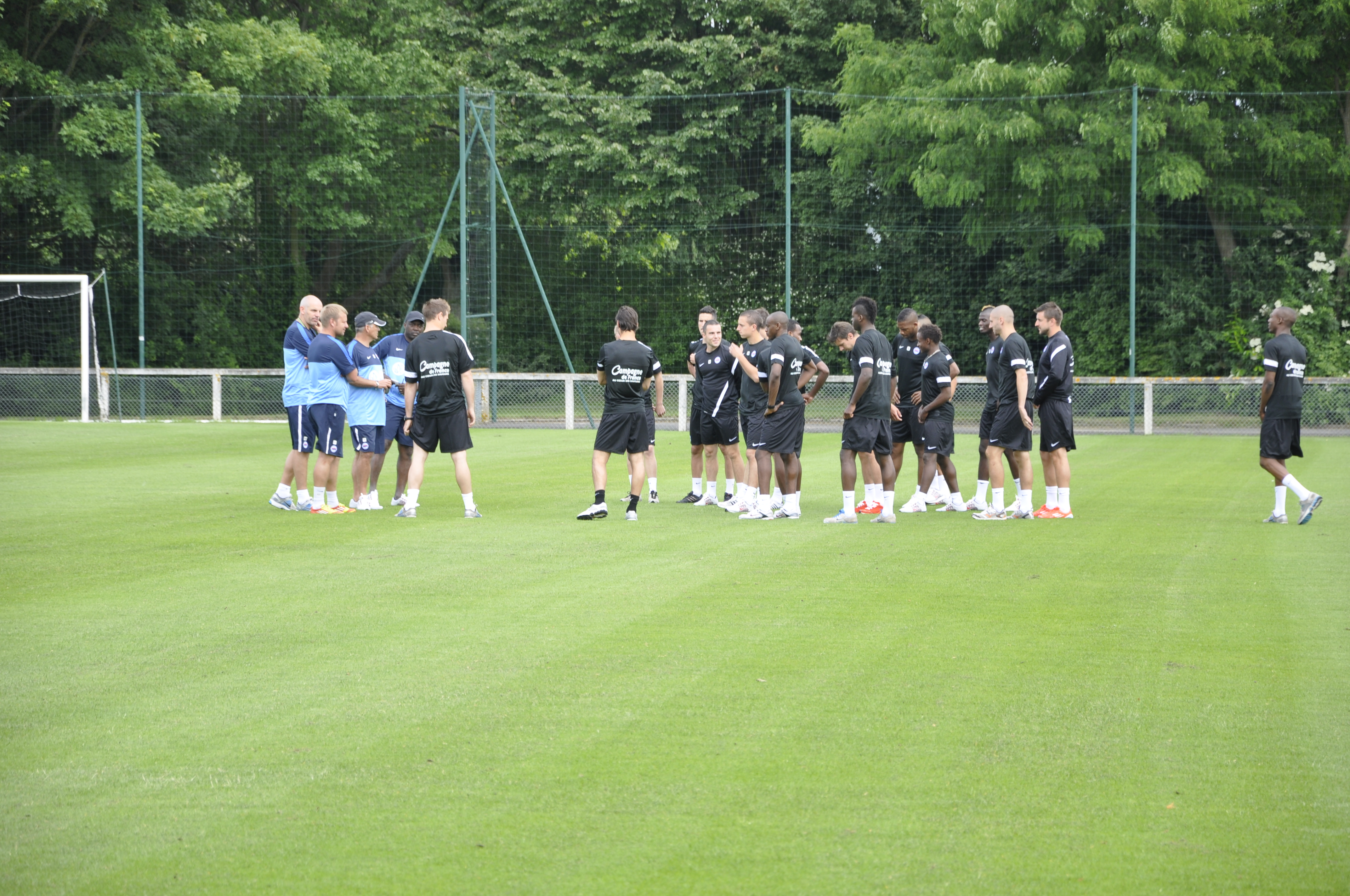 le premier entrainement du SMC 2012-2013